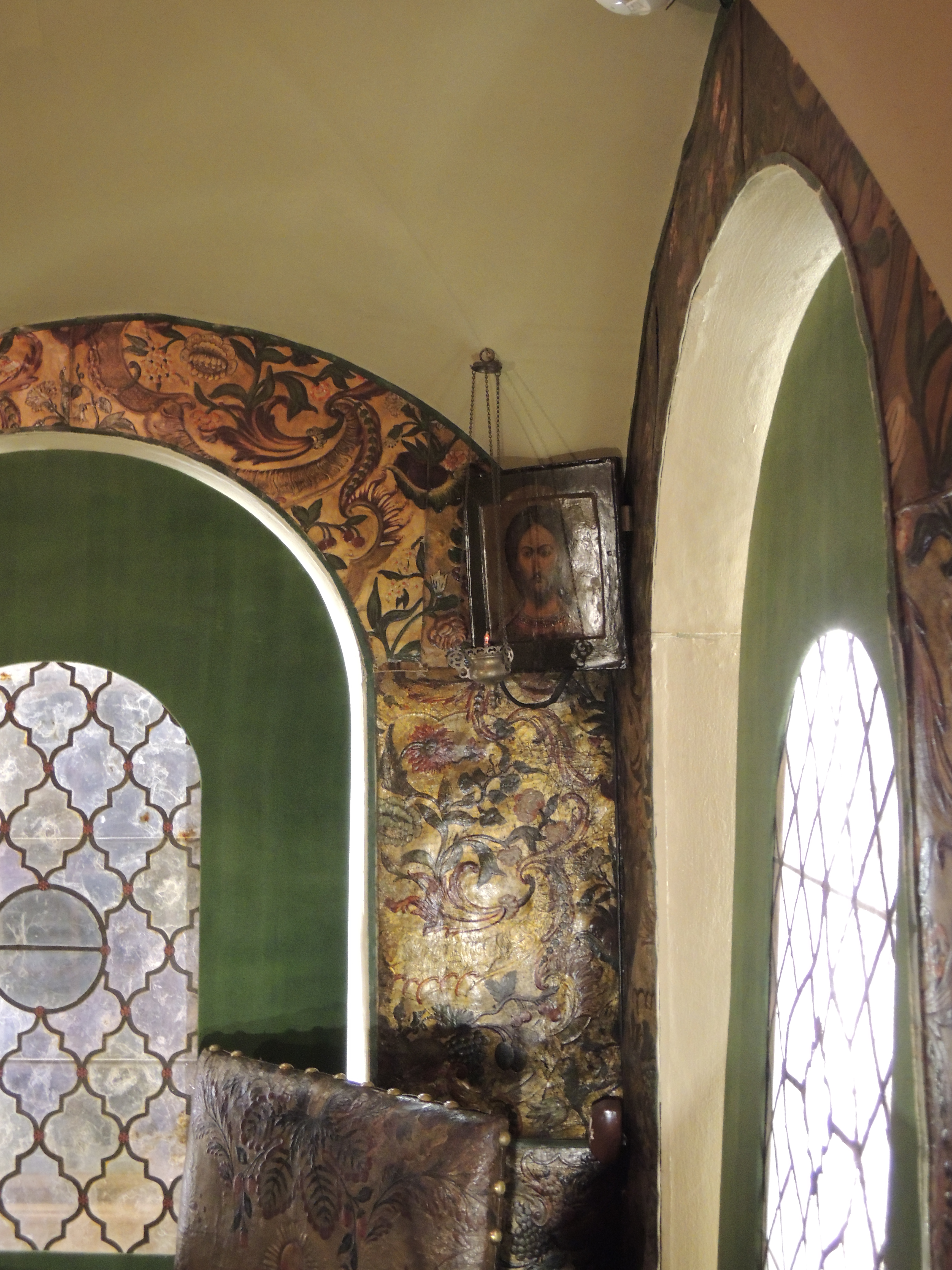 Палаты Романовых